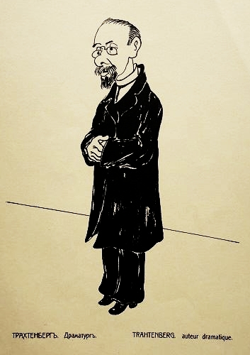 Российский драматург Владимир Осипович Трахтенберг на карикатуре Поля Робера из альбома «Весь Петербург в карикатурах»